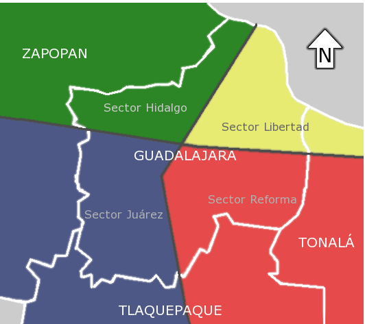 Mapa donde se indican los cuatro sectores de la Zona Metropoplitana de Guadalajara.